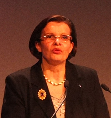 Pascale Sourisse, en janvier 2012